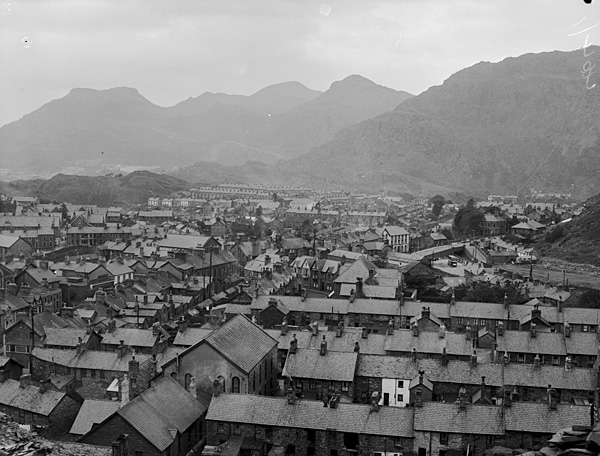 Teitl Cymraeg/Welsh title: Honiadau fod safonau moesol Blaenau Ffestiniog wedi dirywio'n ddychrynllyd Ffotograffydd/Photographer: Geoff Charles (1909-2002) Dyddiad/Date: 3/9/1959 Cyfrwng/Medium: Negydd ffilm / Film negative Cyfeiriad/Reference: (gch20857) Rhif cofnod / Record no.: 3470366 Rhagor o wybodaeth am gasgliad Geoff Charles yn Llyfrgell Genedlaethol Cymru More information about the Geoff Charles Collection at the National Library of Wales Mae ffotograffau Geoff Charles hefyd yn rhan o Broject Europeana Libraries Geoff Charles' photographs also form part of the Europeana Libraries Project